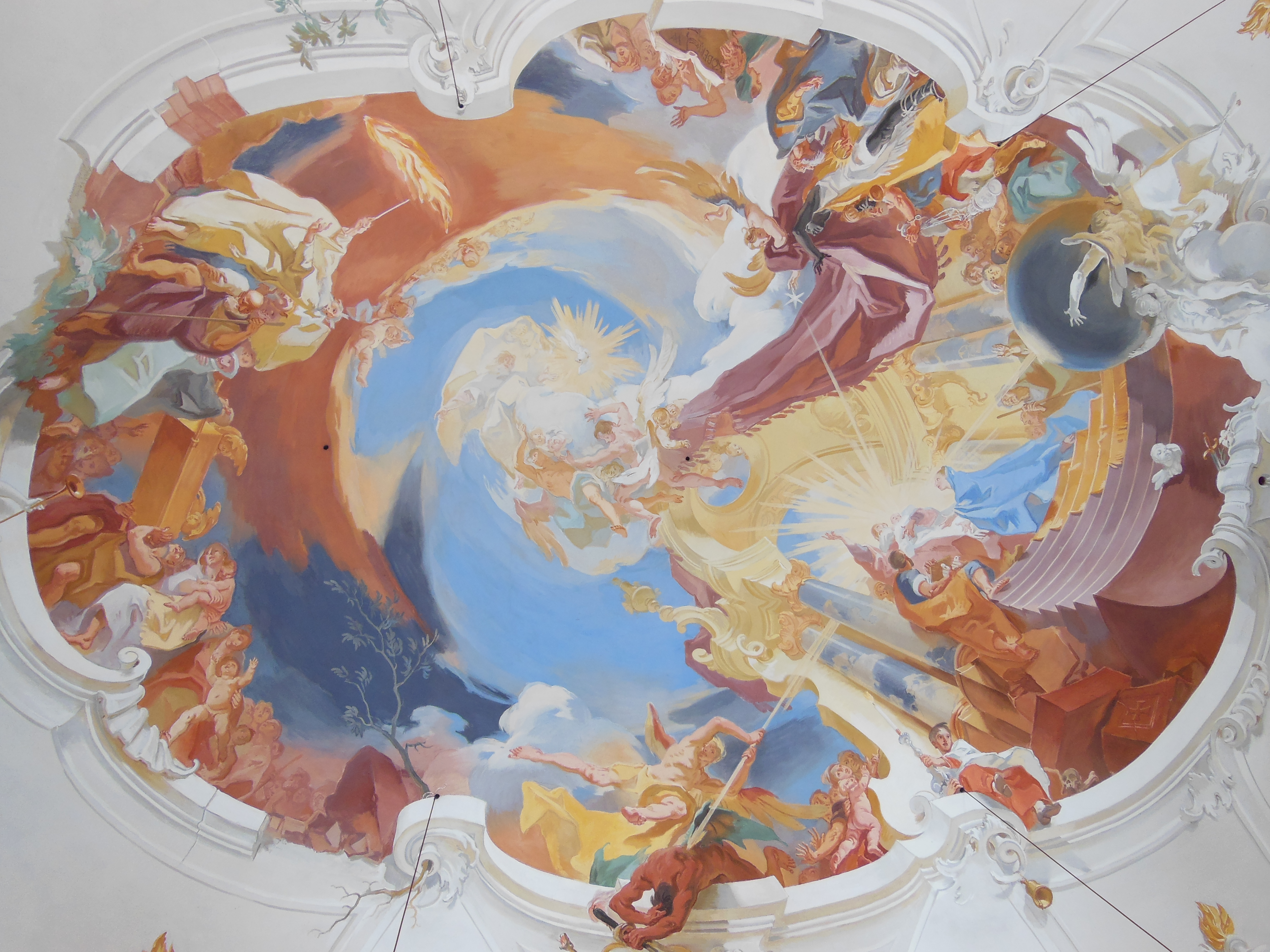 Kath. Pfarrkirche unserer lieben Frau Maria Reinigung, Friedhofskapelle und Kriegerdenkmal beim Friedhof